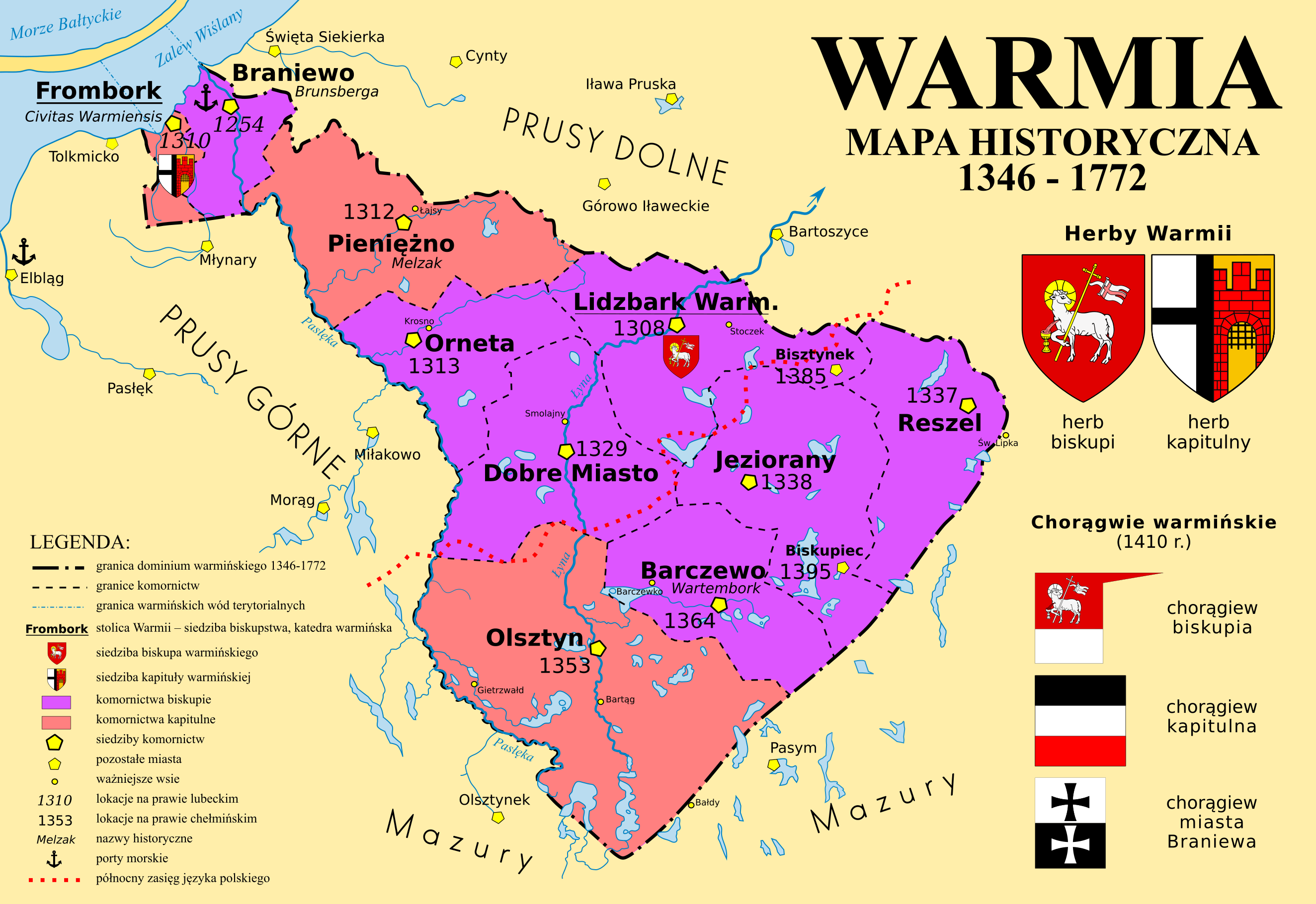 Mapa historyczna Warmii 1346-1772 (na podstawie "Mapy Świętej Warmii" z 1755 roku).